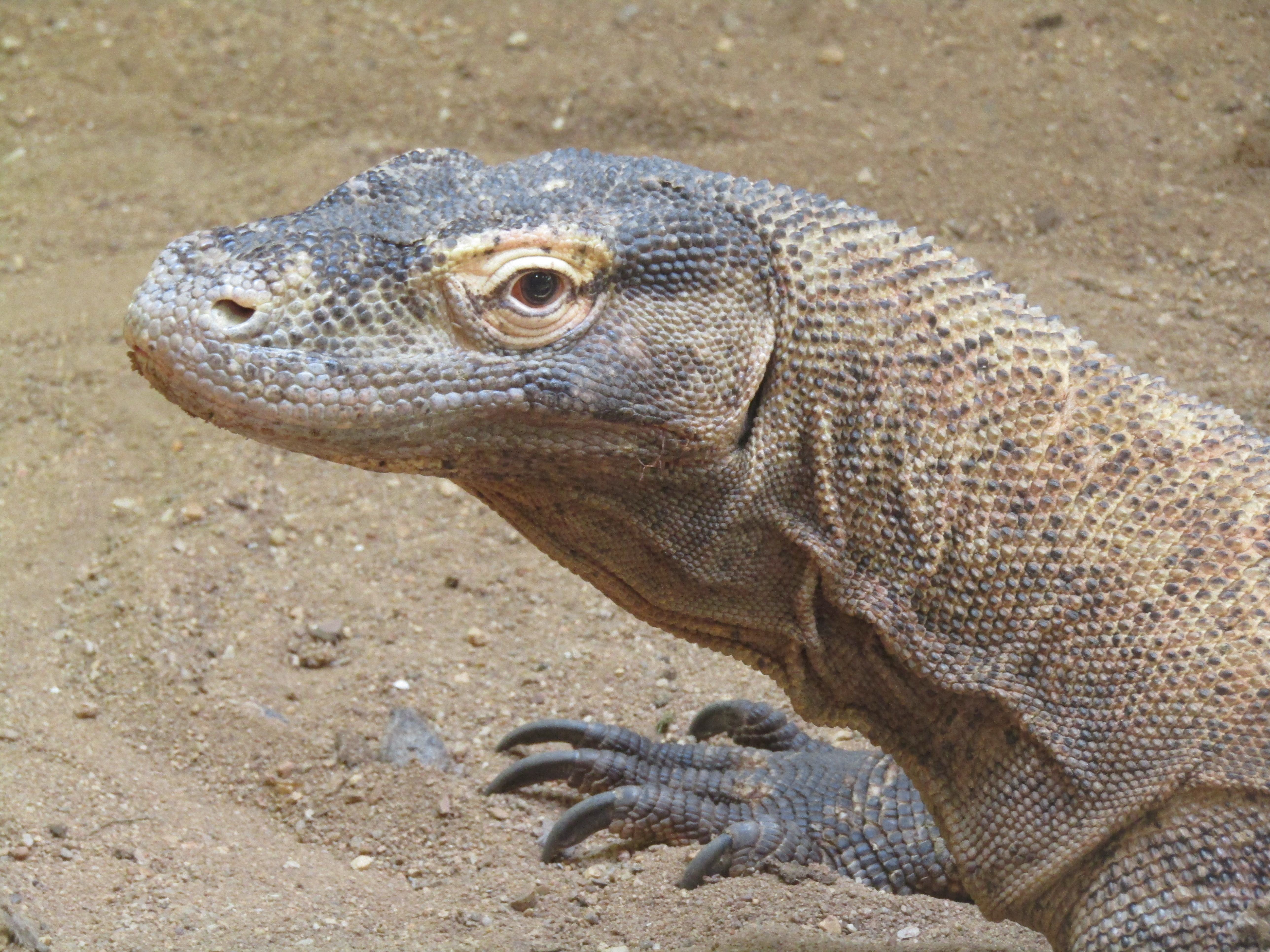 Varan komodský (Varanus komodoensis) v ZOO Plzeň (detail hlavy)